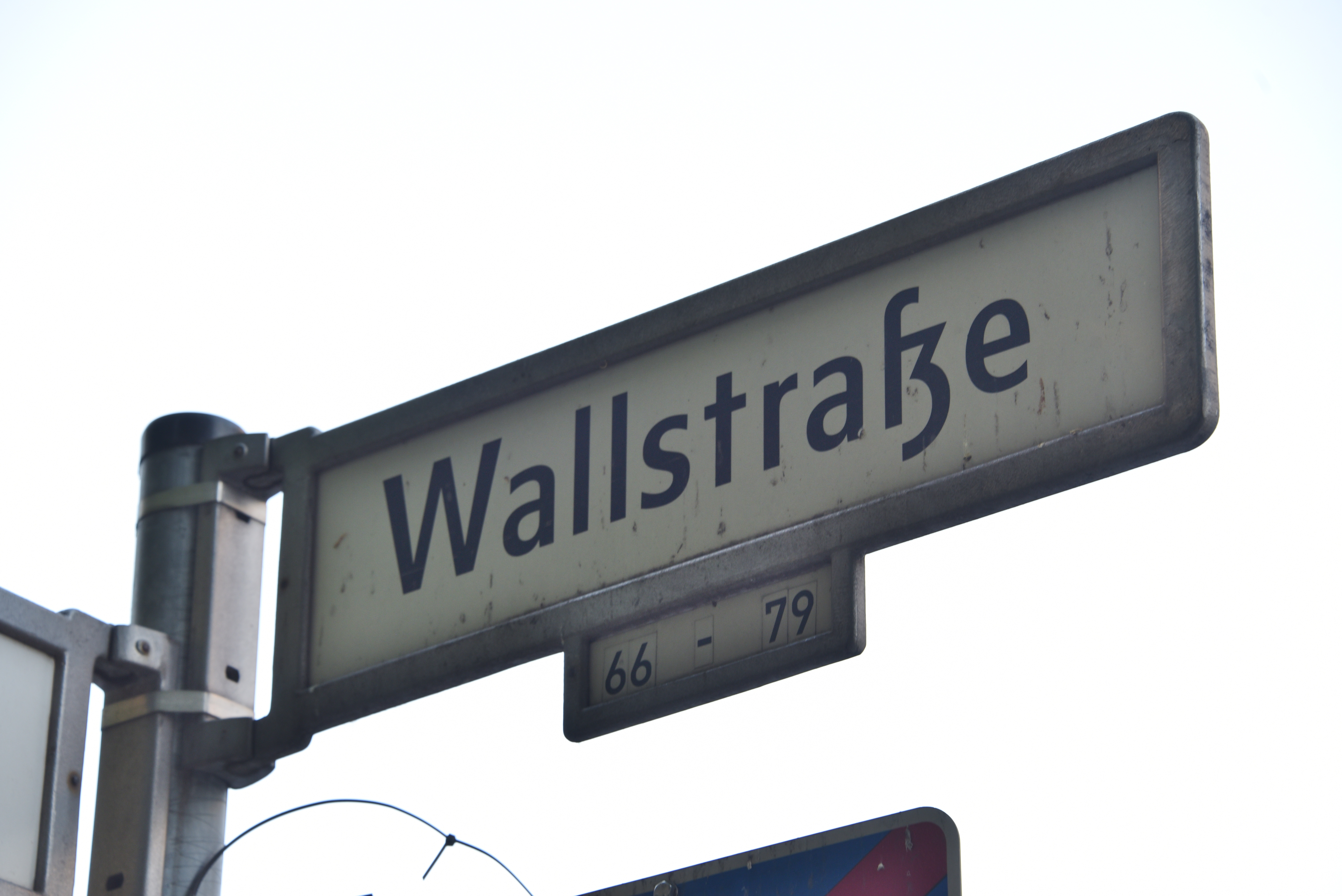 Street sign Wallstraße